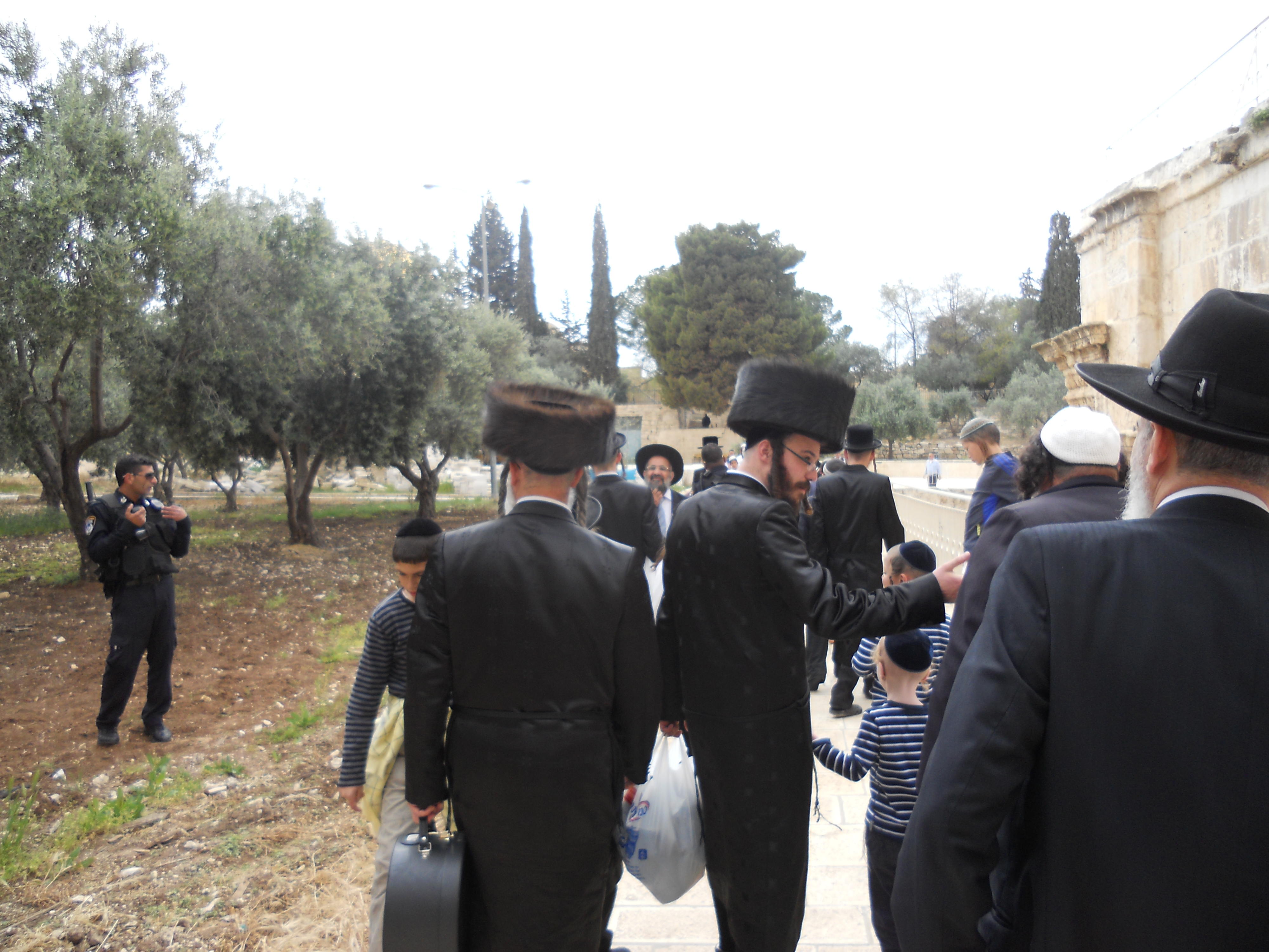 עלית חרדים להר הבית פסח תשע"ע 2011